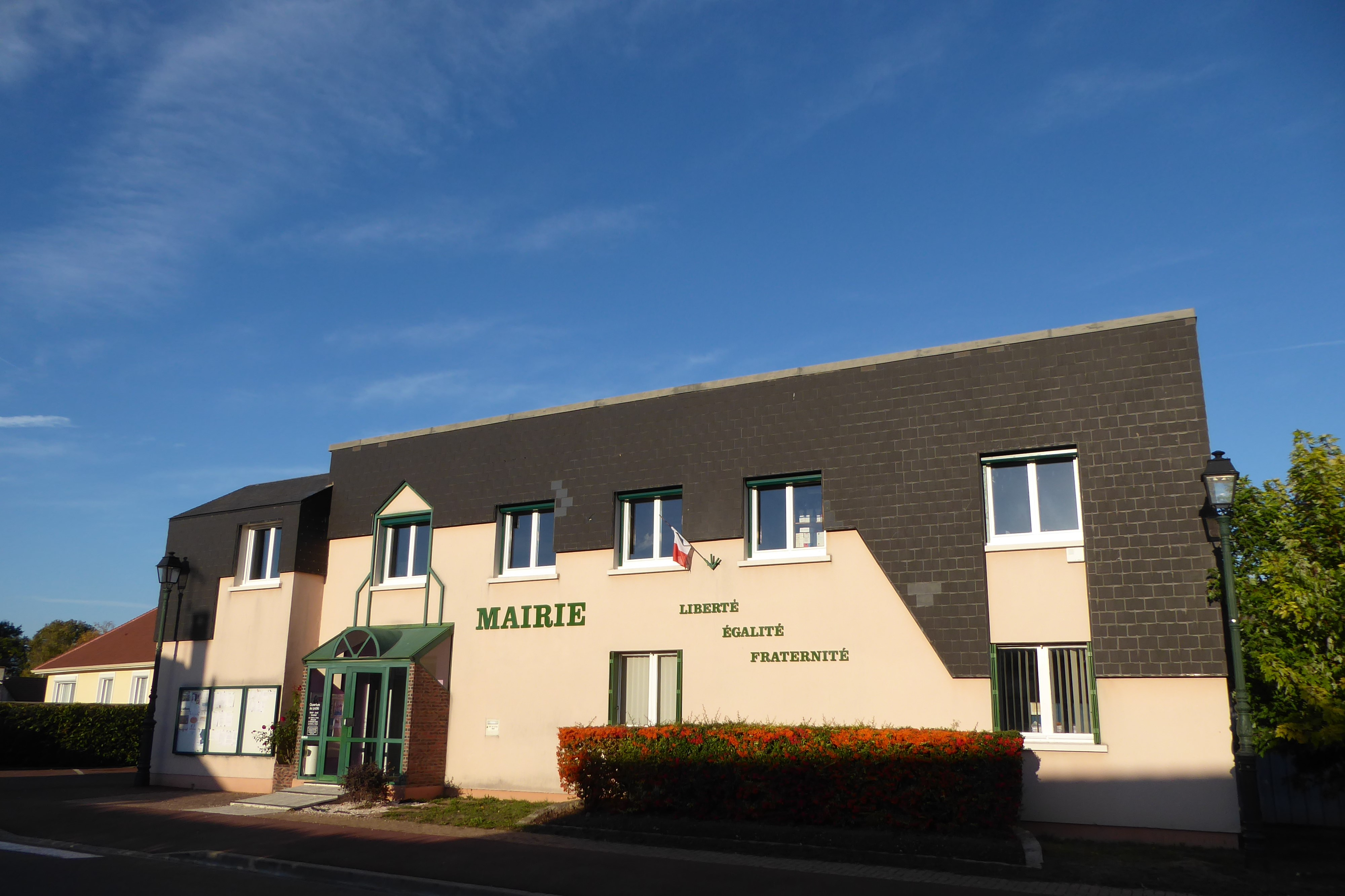 mairie de Luray, Eure-et-Loir, France.